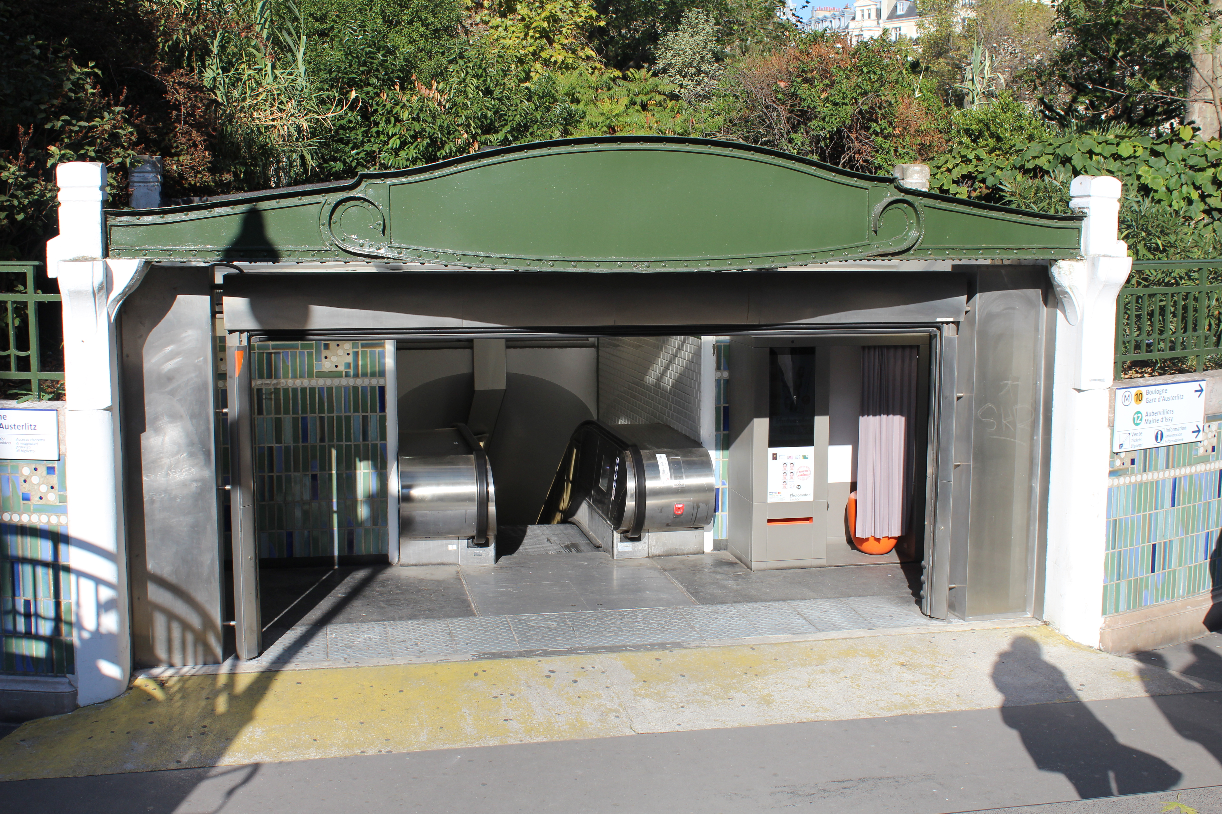 Entrée de la station de métro Sèvres Babylone à Paris.